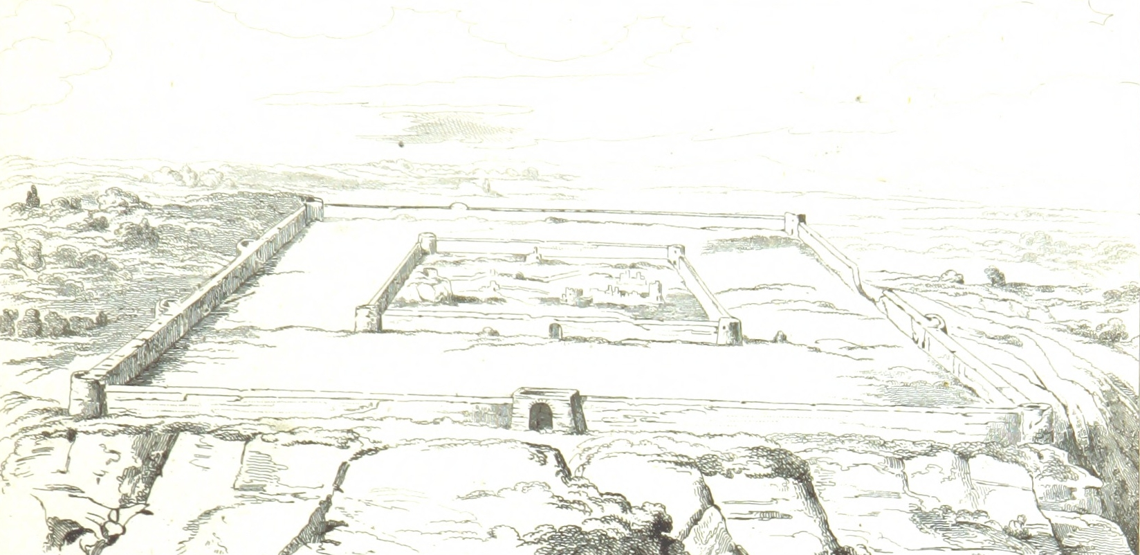 Le "Castellum de Jublains", gravure de la "France historique et monumentale" de Jean-Abel Hugo (1836)